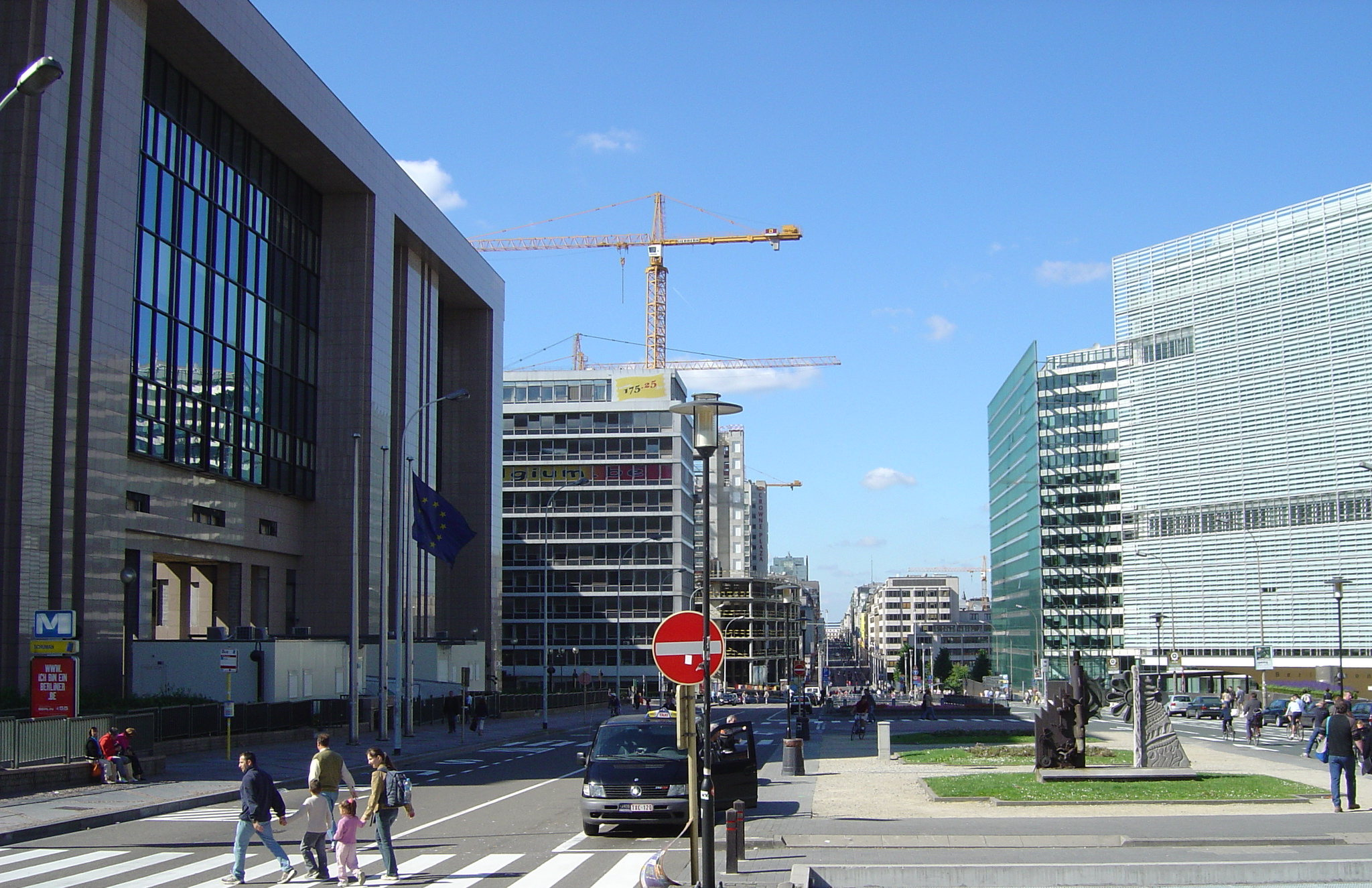 Quartier européen, Bruxelles